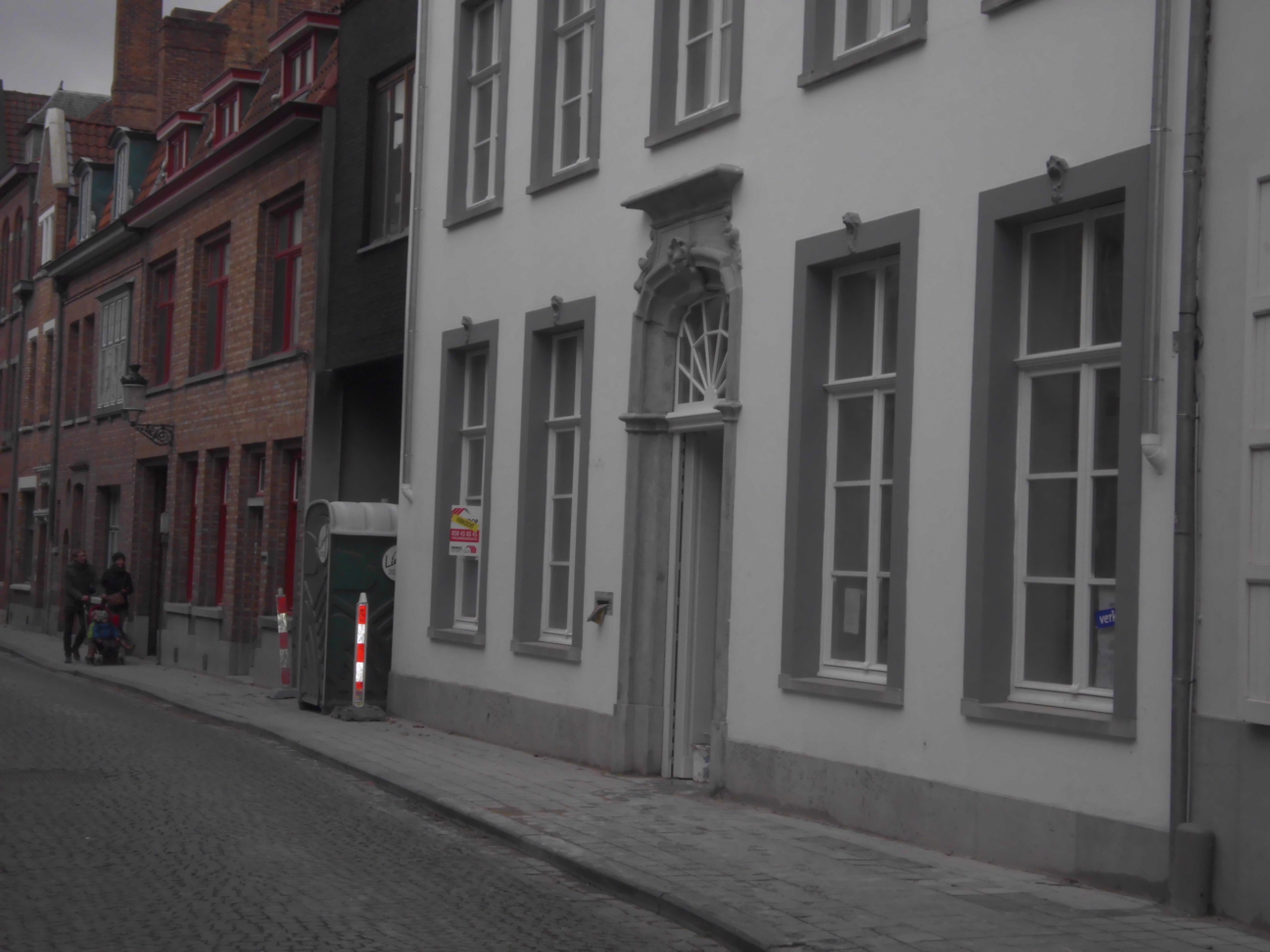 Nieuwe Gentweg 47, 8000 Brugge. Vroegere Mariaschool, weeshuis van de Zusters Maricolen. Later onderdeel van de Avondschool, voorloper van het Vrij Technisch Instituut Brugge.